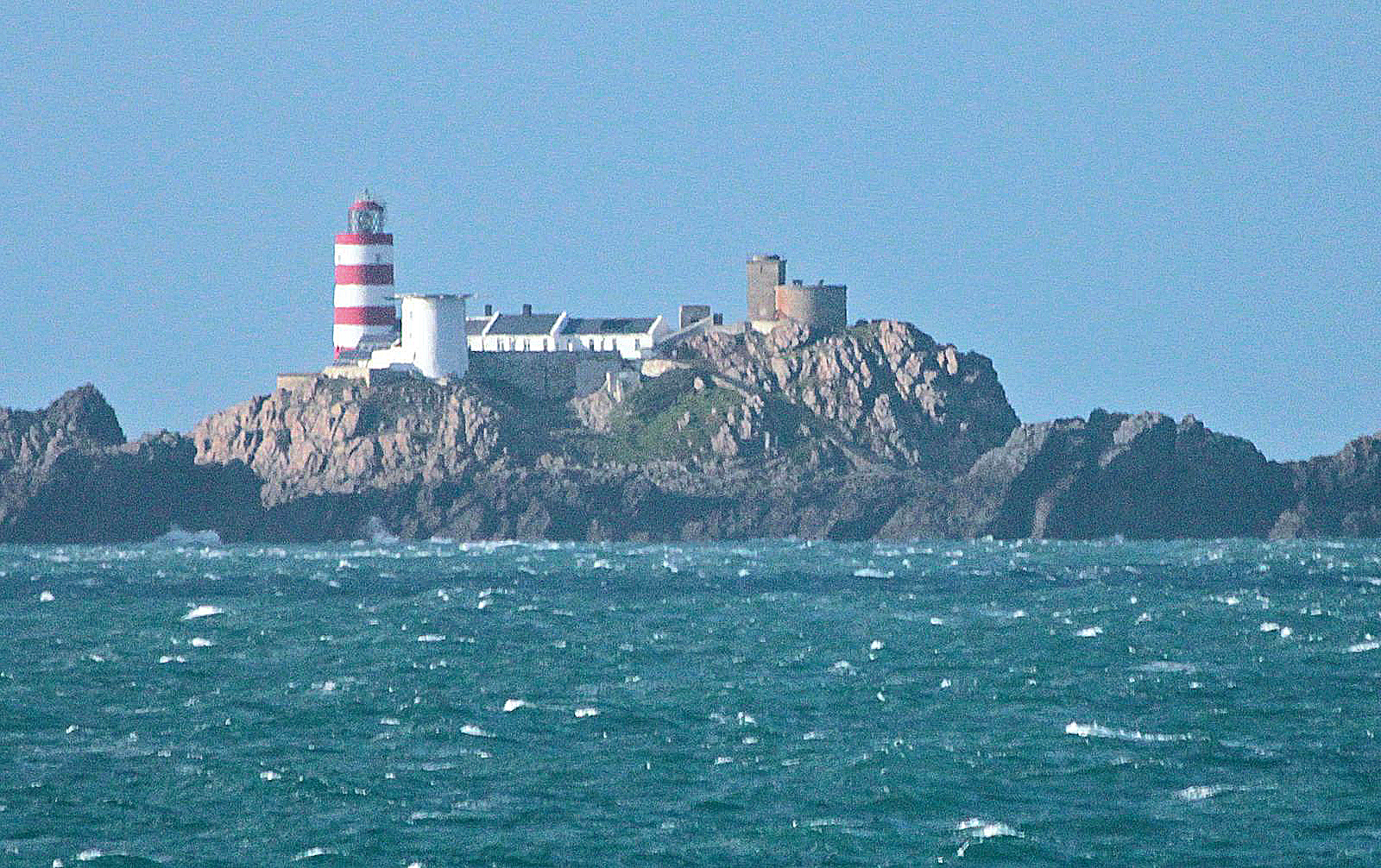 Los Faros de Casquets en las islas del canal de la mancha. Fotografía tomada desde el ferry Condor Liberation durante la travesía Guernsey-Poole